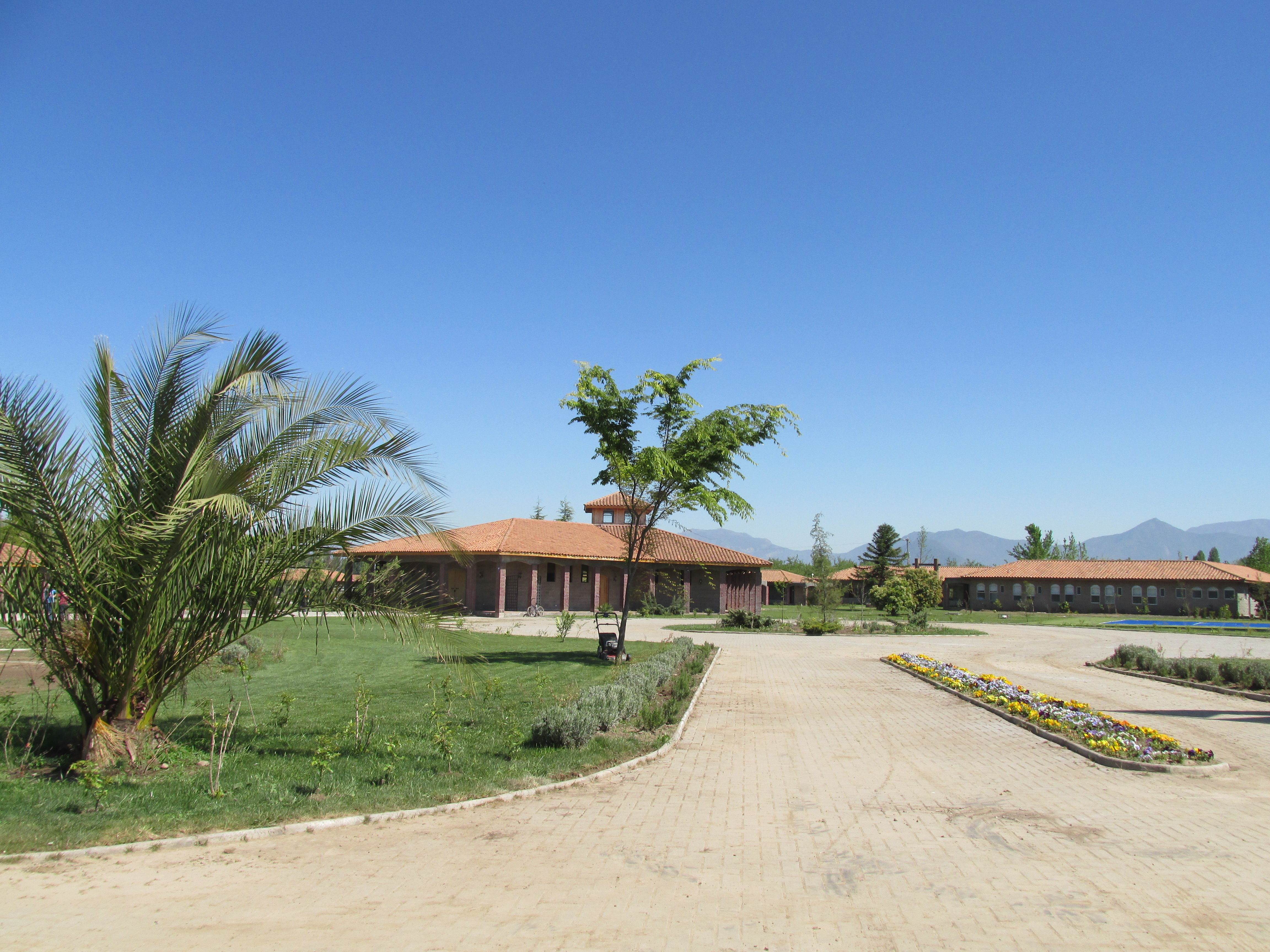 Complejo Deportivo Monasterio Celeste en Requinoa